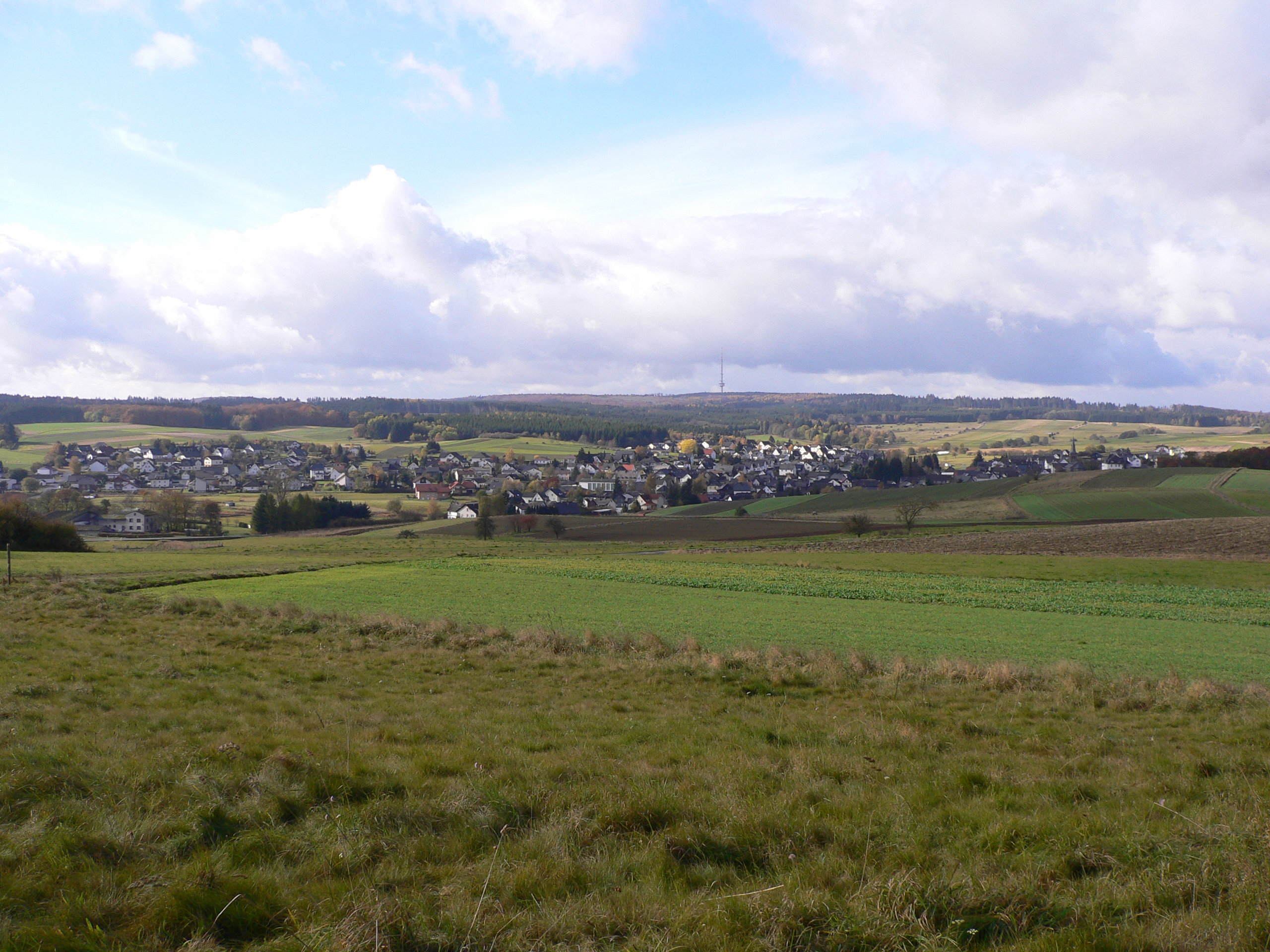 Bottenhorner Hochfläche mit Bottenhorn und Sender Angelburg im Hintergrund, von der 'Scheid' aus gesehen, im rechten Bildhintergrund ist die Landebahn des Flugplatzes zu sehen